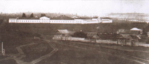 Іжевський арсенал: фото